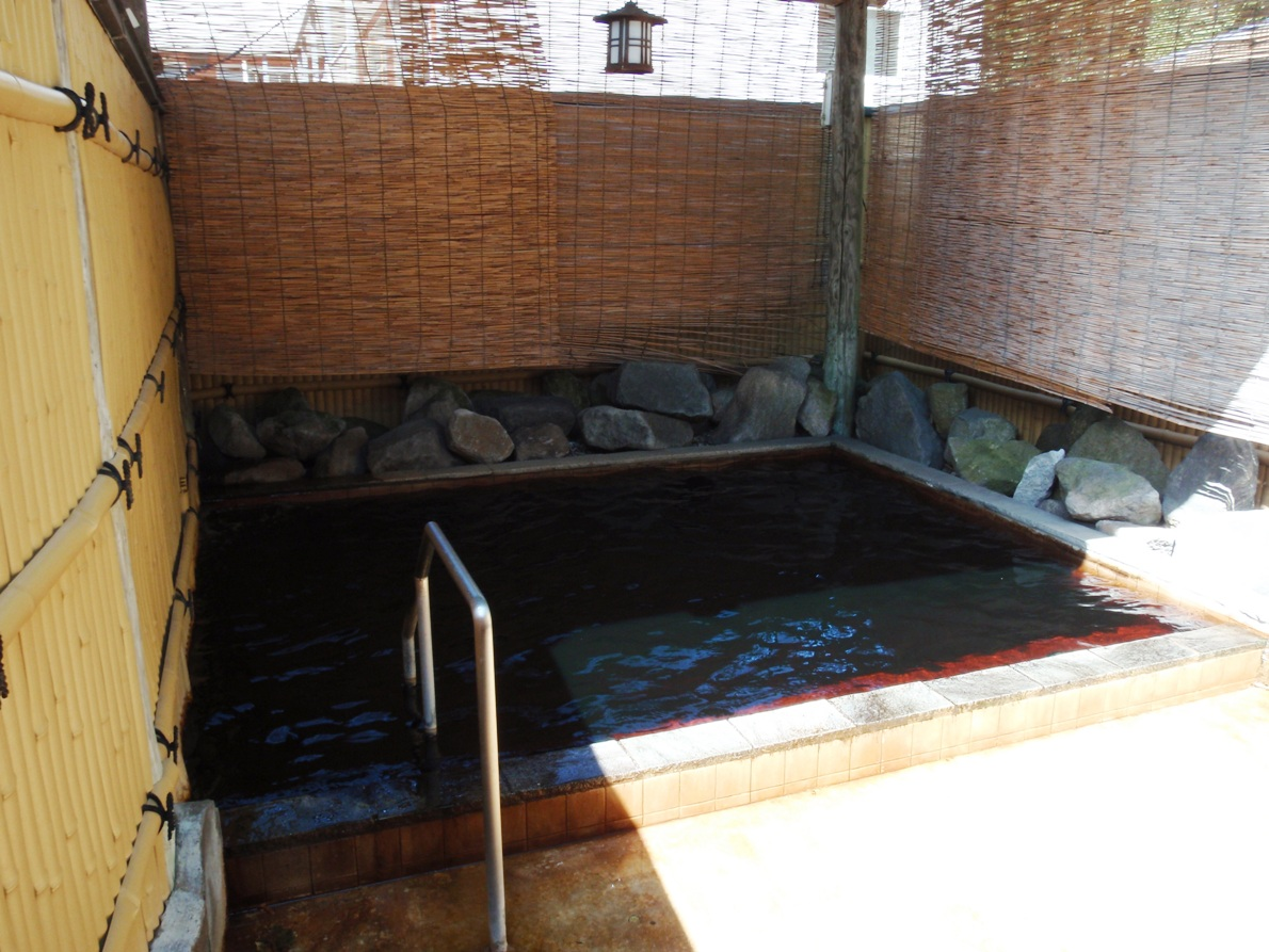 北海道白老温泉、白老温泉ホテル露天風呂